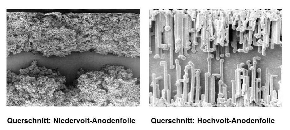 Querschnitt durch eine Niedervolt- und eine Hochvolt-Anodenfolie für Aluminium Elektroytkondensatoren